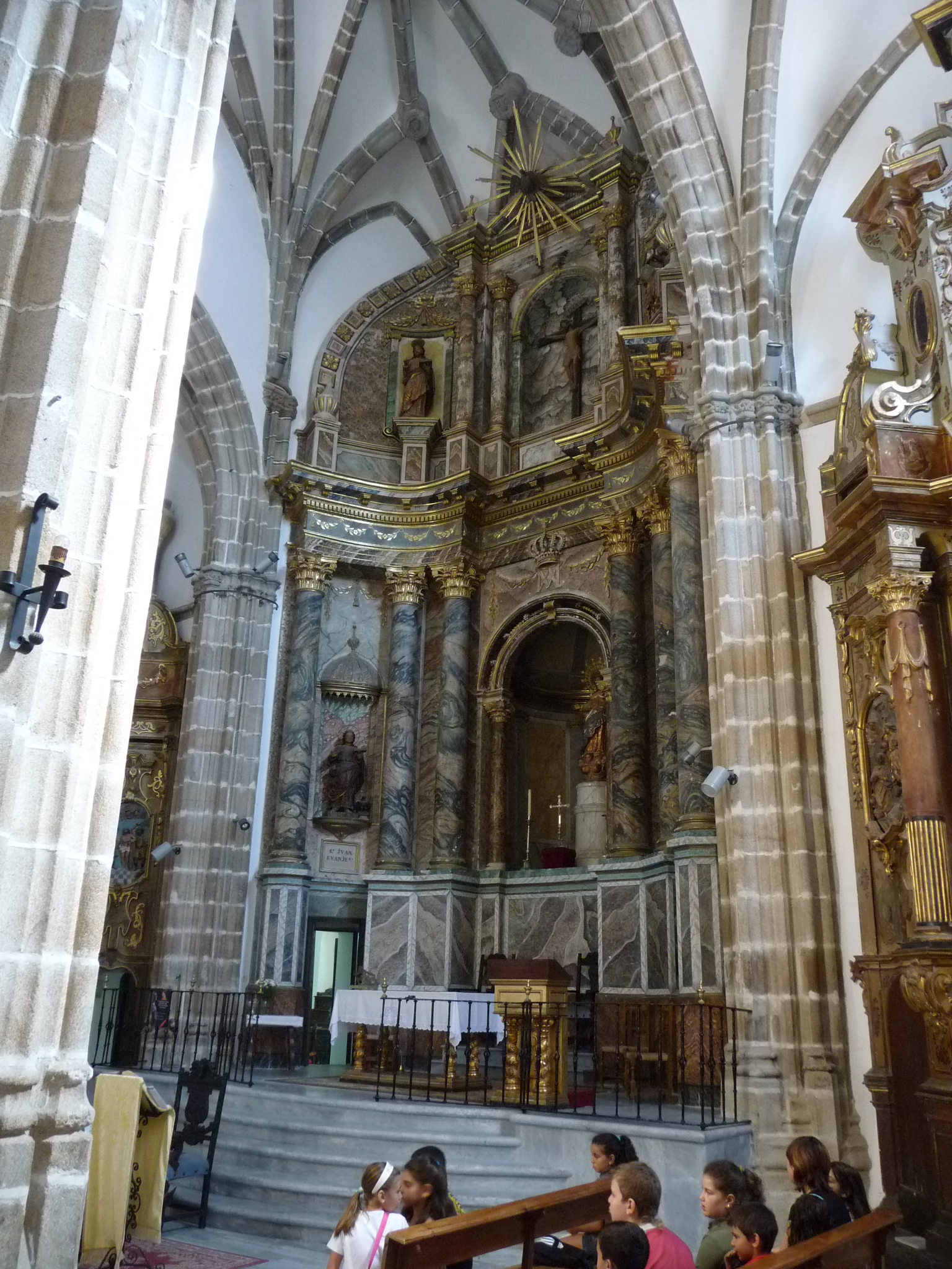 Aroche-P1040774.JPG